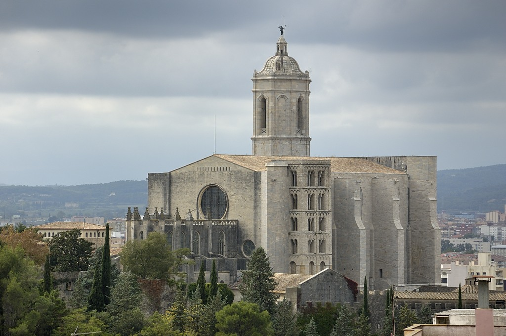 La Catedral de Santa Maria de Girona